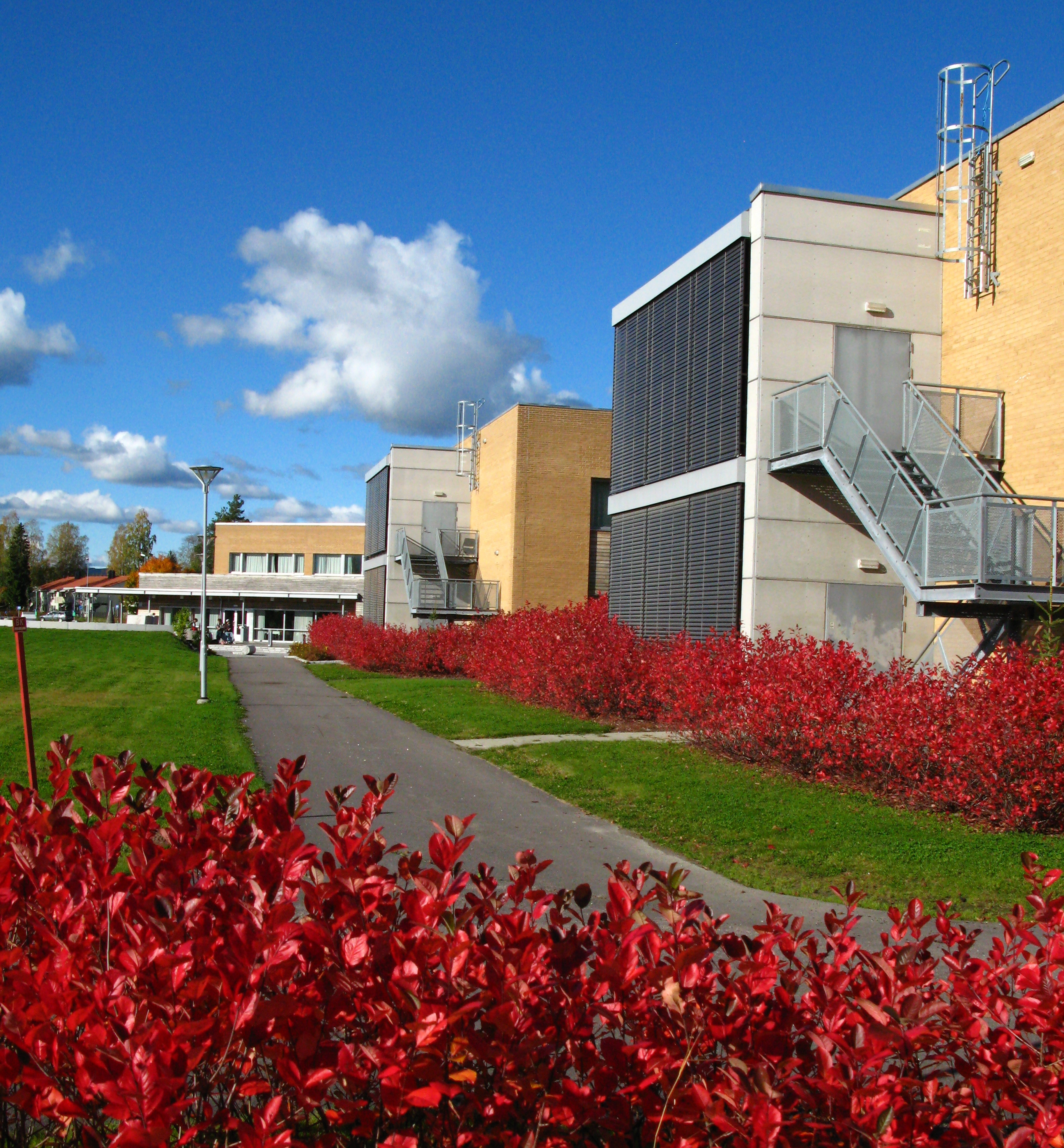 Nannestad videregående skole, skolebygningen i høstsol